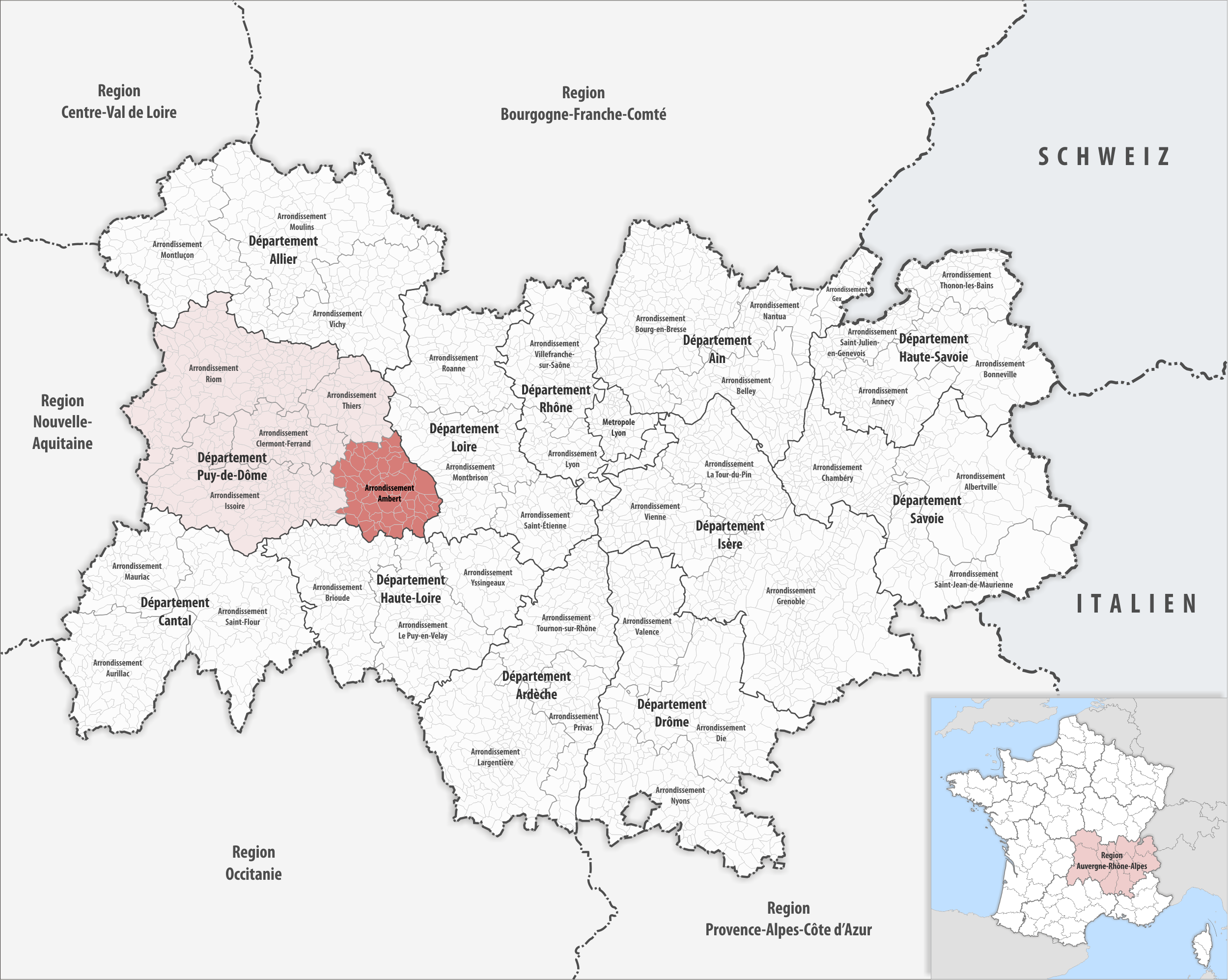 Lage des Arrondissements Ambert